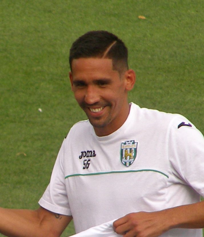 Ґвідо Кортеджано під час представлення команди "Карпати" (Львів) перед сезоном 2017/18. Зустріч з уболівальниками